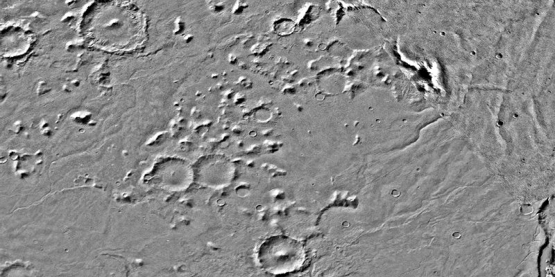 Coronae Montes, Mars